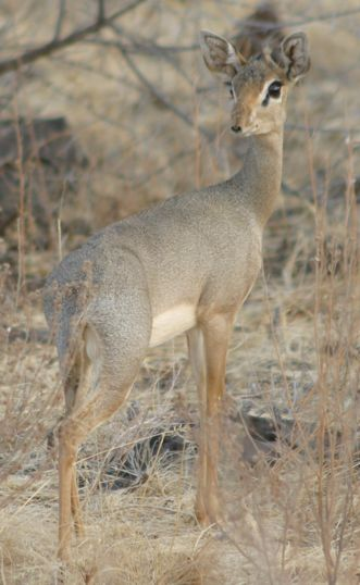 A dik-dik photographed in Samburu , Kenya